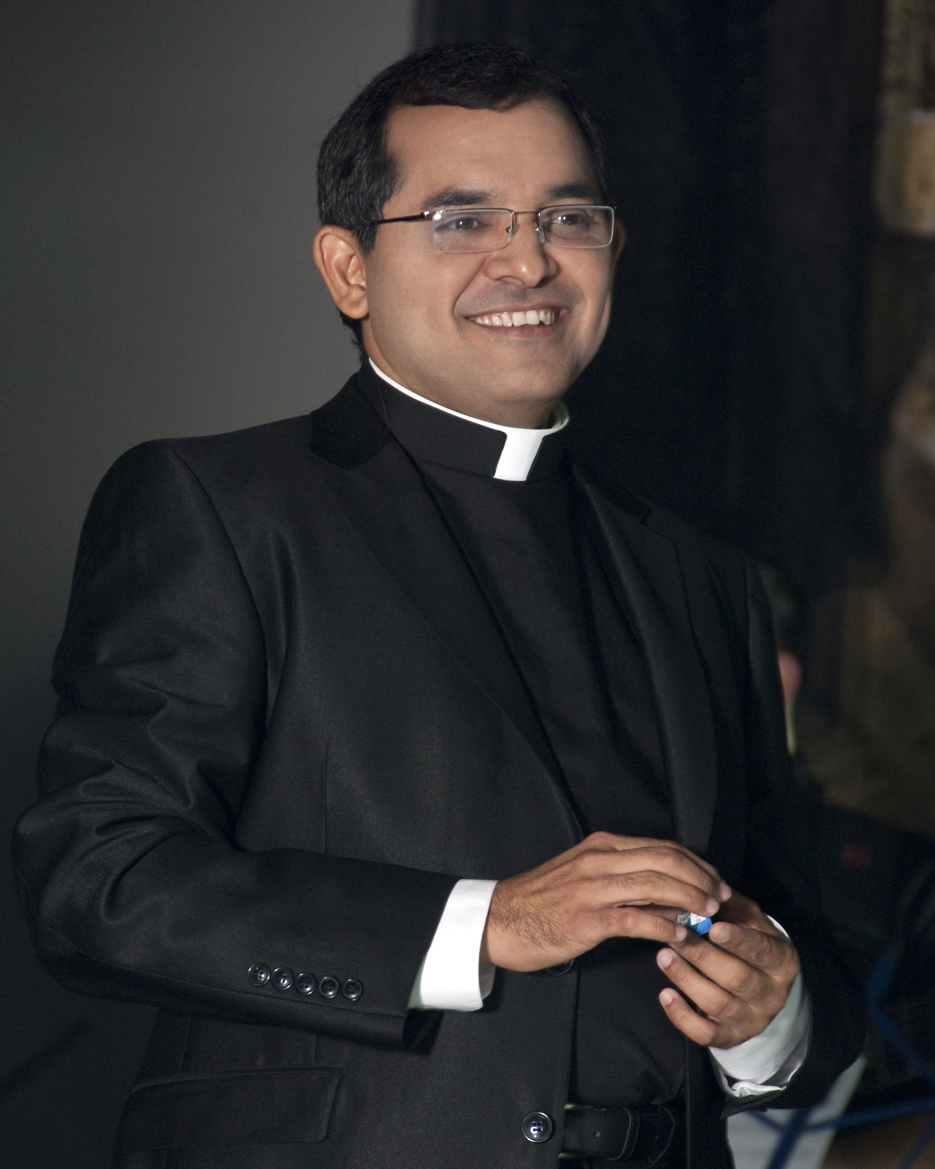 CONCIERTO PADRE JOSE GREGORIO